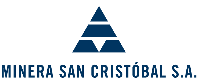 Logotipo de Minera San Cristóbal S.A.